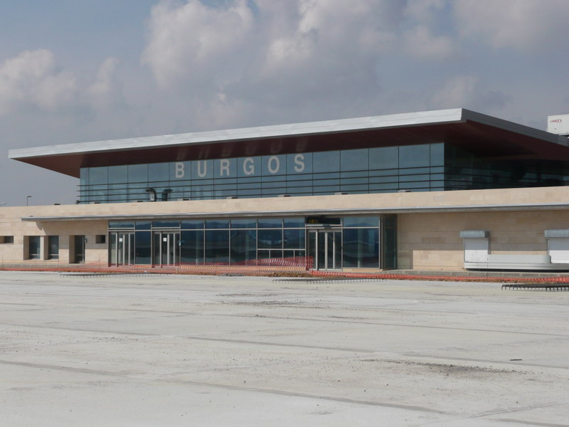 Terminal de Pasajeros del Aeropuerto de Burgos (España)